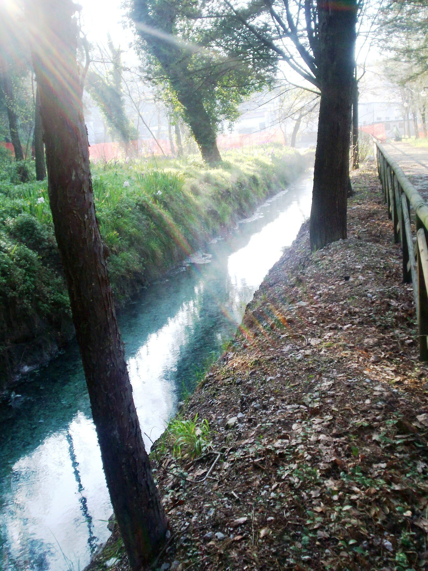 particolare di un ruscello all'interno del parco delle terme di Telese Terme ( Bn) di prima mattina